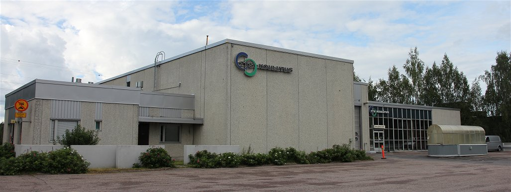 TTS Koulutuksen logistiikkalalan toimipiste Vantaan Varistossa (Sarkatie 1, 01720 Vantaa). TTS Koulutus on Työtehoseuran koulutusta tarjoava organisaatio ja eräs Suomen toisen asteen ammatillista tutkinto-opetusta tarjoavista oppilaitoksista.